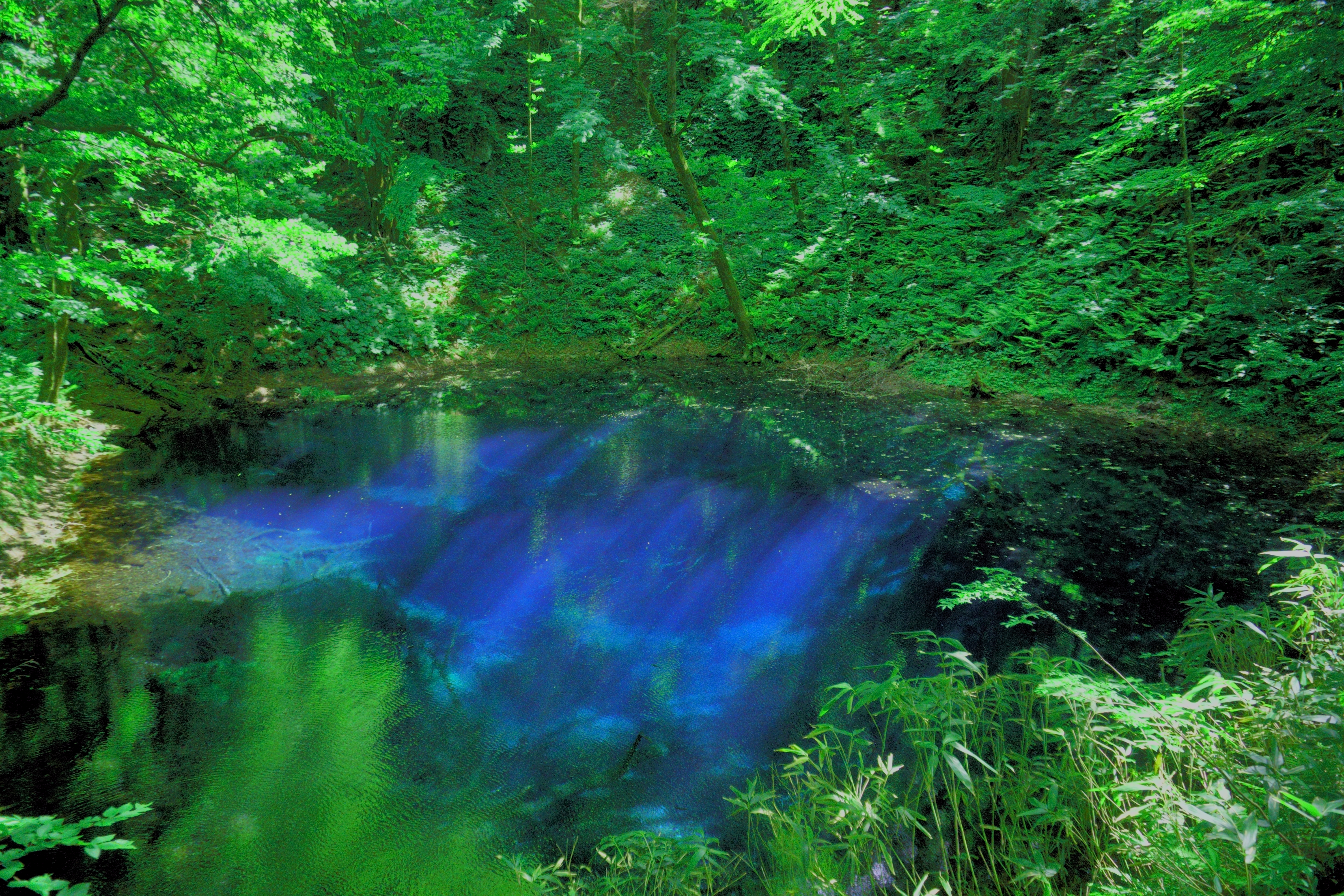 青森県西津軽郡深浦町、十二湖にある池の中でも最も著名な青池。面積はわずか1aにも満たないが、神秘的な深い青の水を湛える。十二湖は白神山地の一角にあるが、世界自然遺産の核心地域外にあり、津軽国定公園内の自然景勝地である。